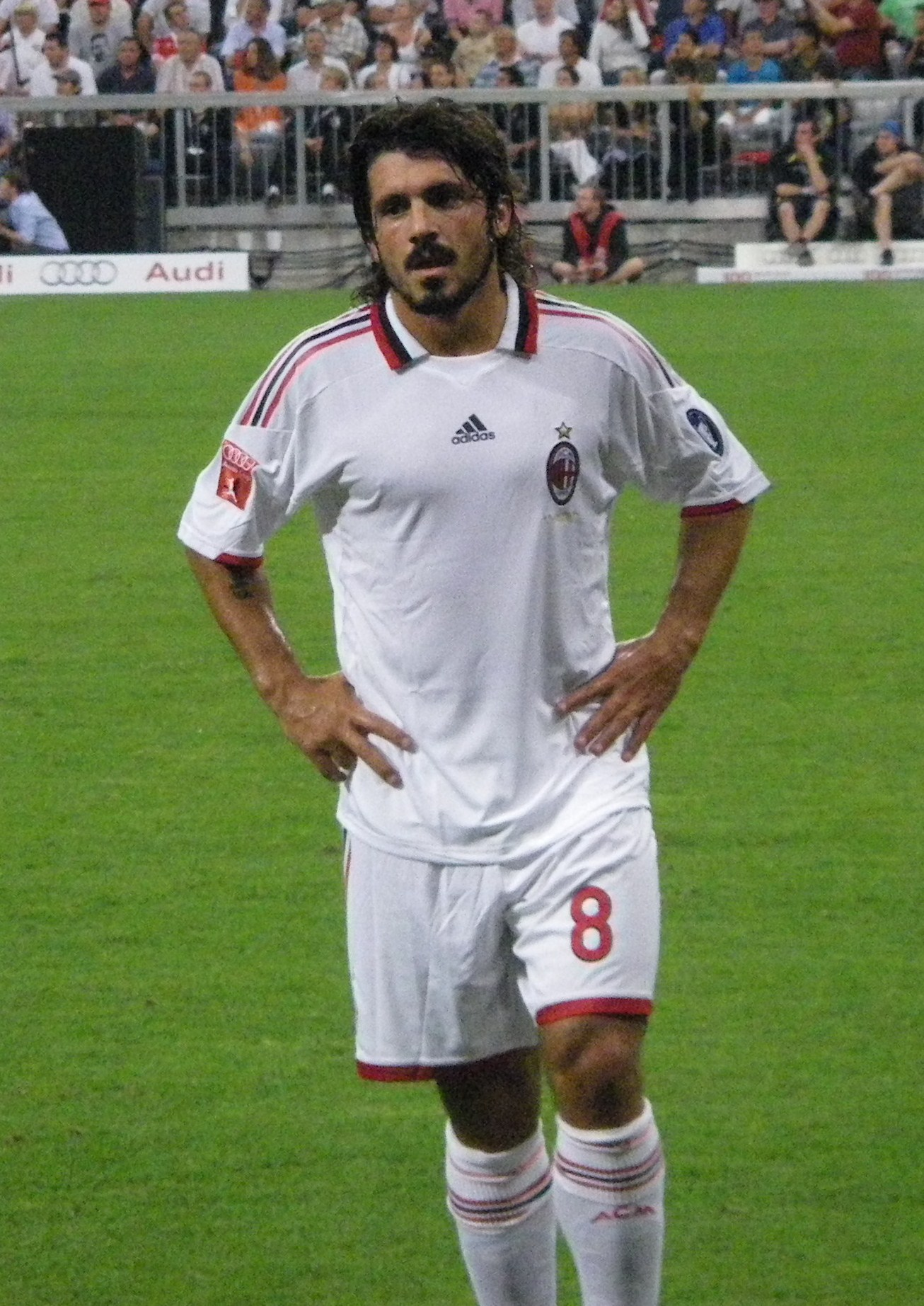 Italienischer Fußballspieler in Diensten des AC Milan